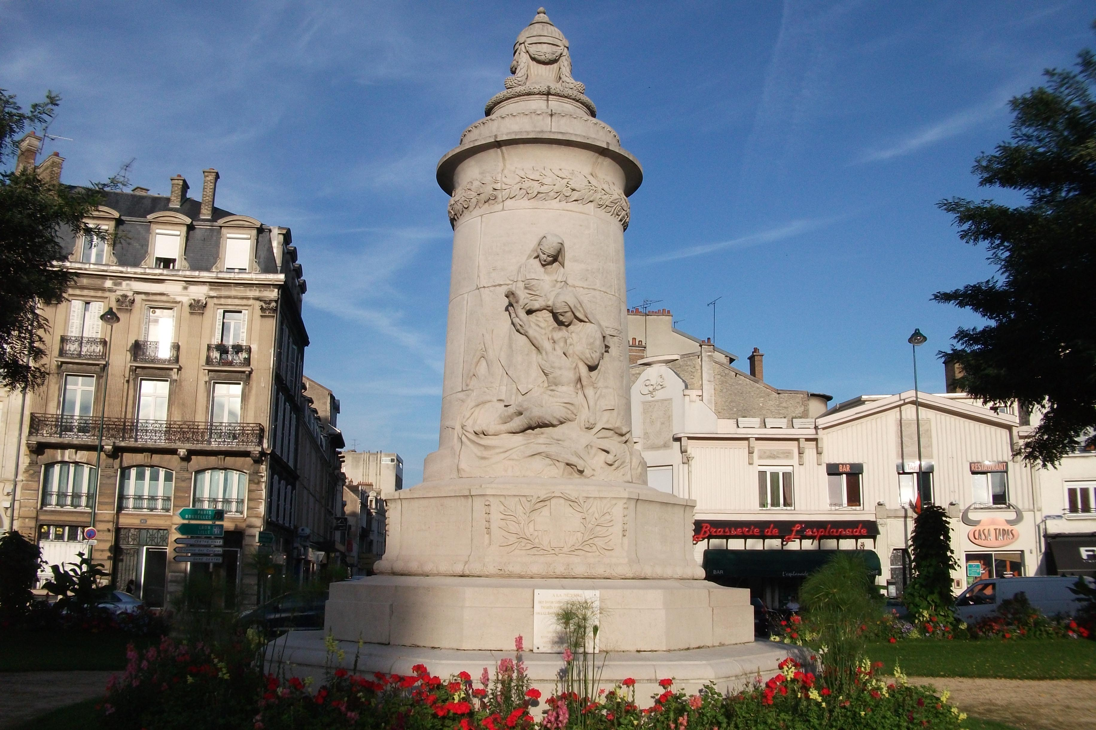 Monument en hommage aux infirmières du monde qui fut construit après une souscription internationale par Juliette Adam sur la place Aristide Briand de_Reims. En arrière plan la rue Jean Jaurès. Architecte Charles Giraud, sculpteur Denys Puech, inauguré le 11 novembre 1924.